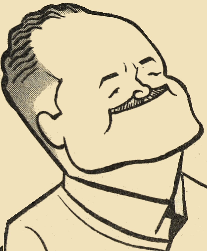 Autocaricatura de René Ríos "Pepo" en "Los actuales dibujantes de Zig Zag" (1955). En Medio siglo de Zig-Zag : 1905-1955. Santiago : Zig-Zag, 1955. 462 páginas